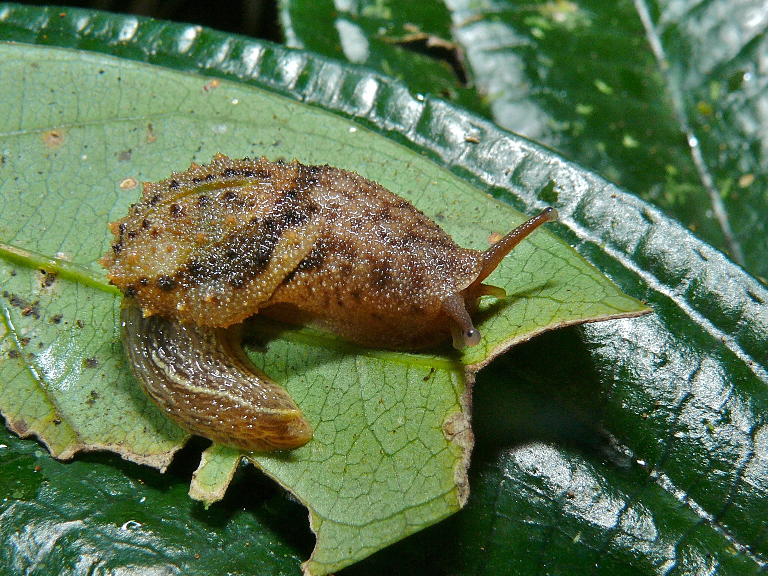 Mount Kinabalu NP, Sabah, MALAYSIA